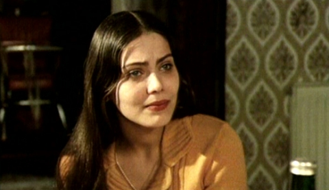 Képkocka az „Olcsó regény” (Romanzo popolare) című filmből